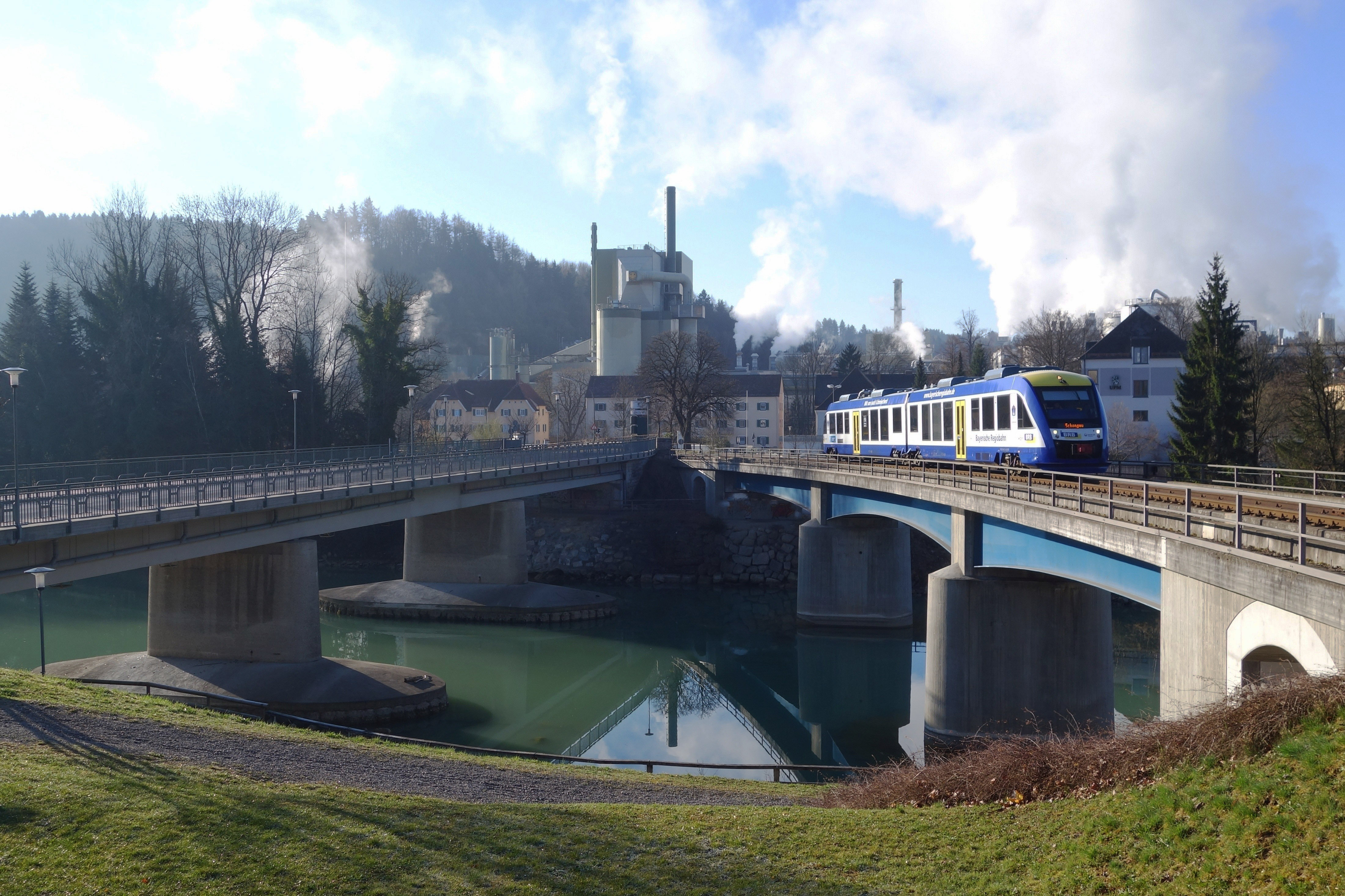 Straßen- und Eisenbahnbrücke über den Lech in Schongau. Auf letzterer der VT 214 „Schmiechen“ der Bayerischen Regiobahn. Im Hintergrund die Papierfabrik der UPM-Kymmene.